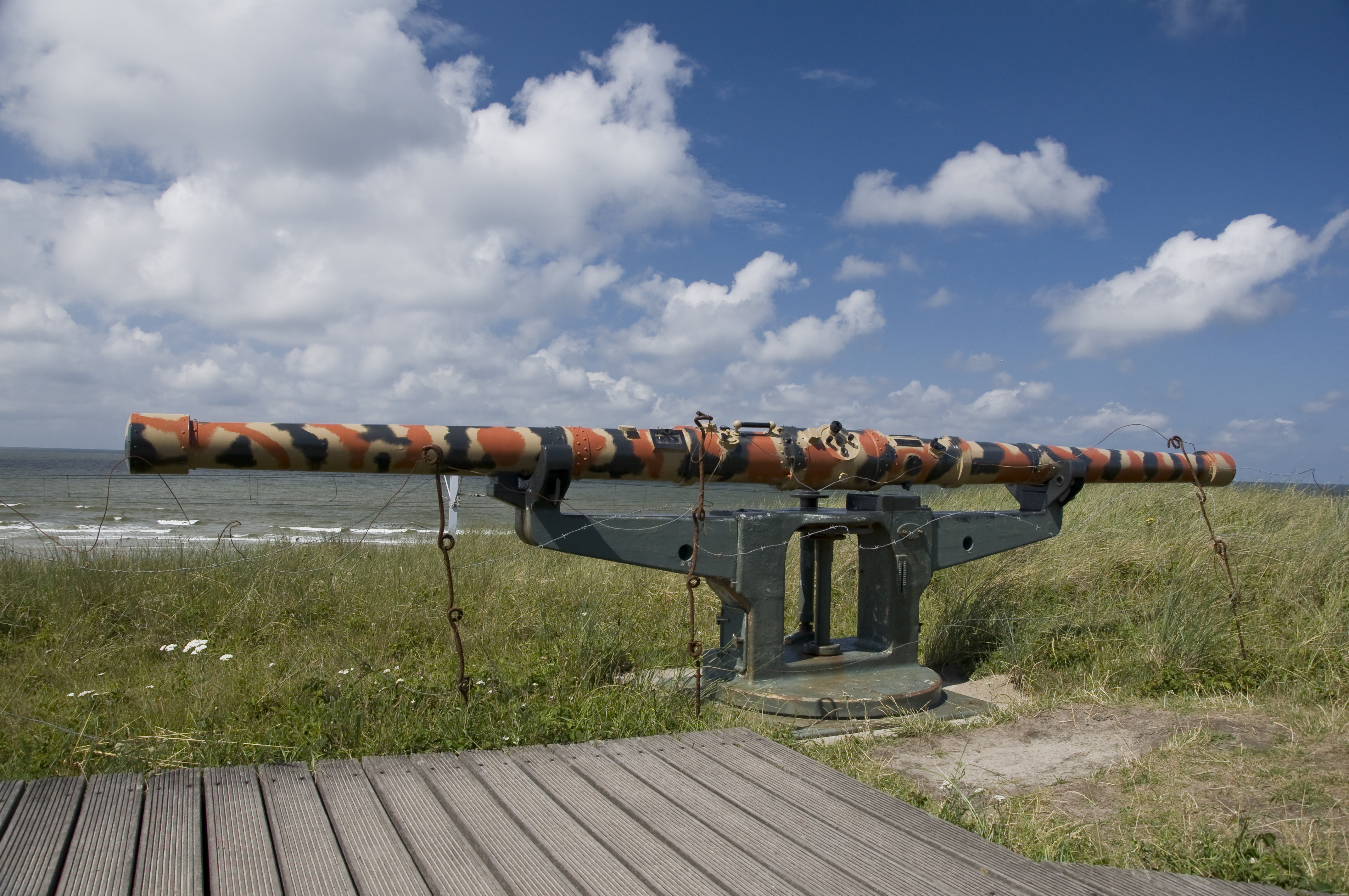 Een afstandsmeter in het Openluchtmuseum Atlantikwall te Raversijde, Oostende, België